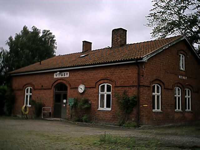 Vitaby station. Copyright Väsk 2004.